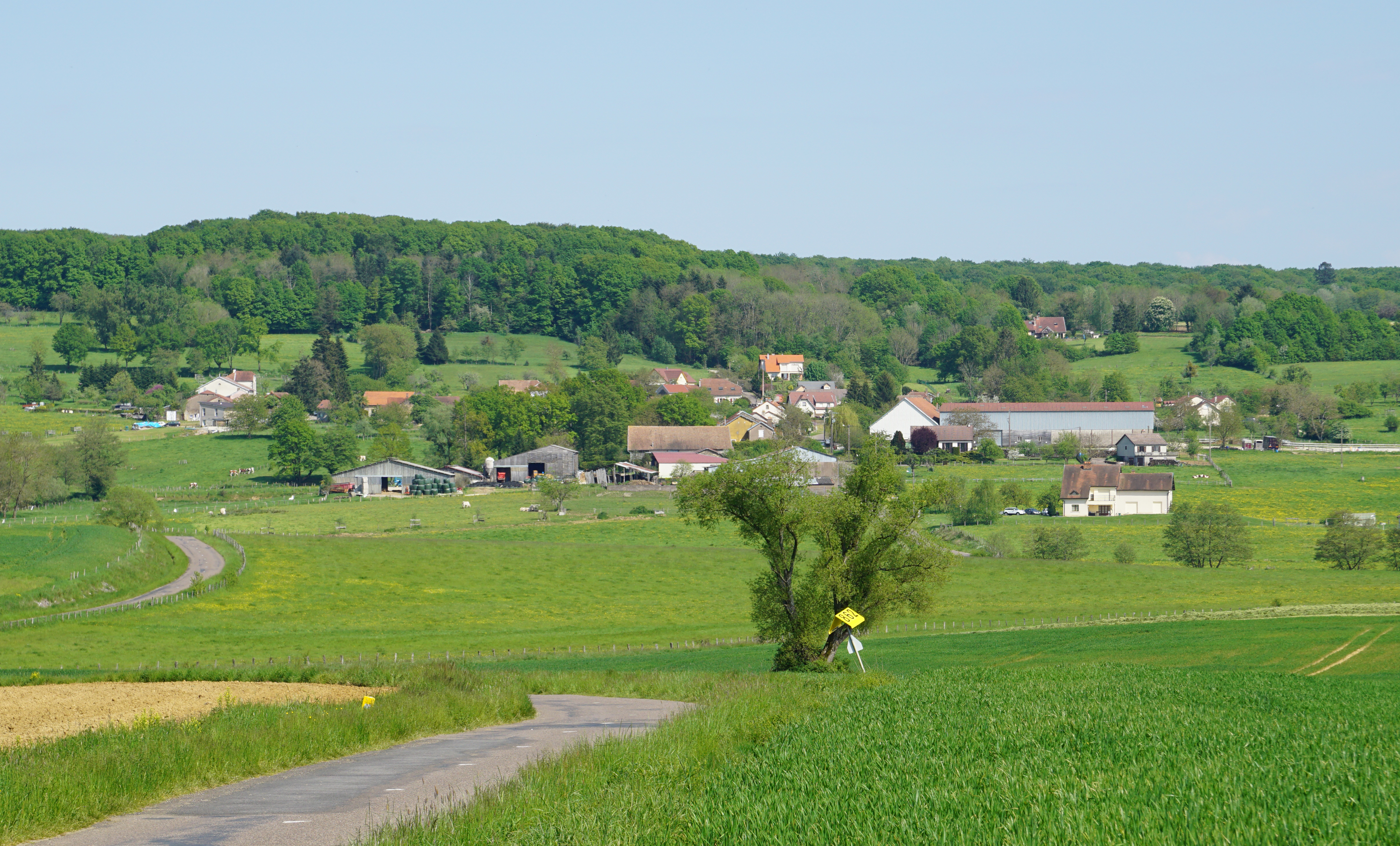 Vue générale de Châteney (Haute-Saône).